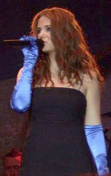 Lena Katina en concert en solo en juin 2010.